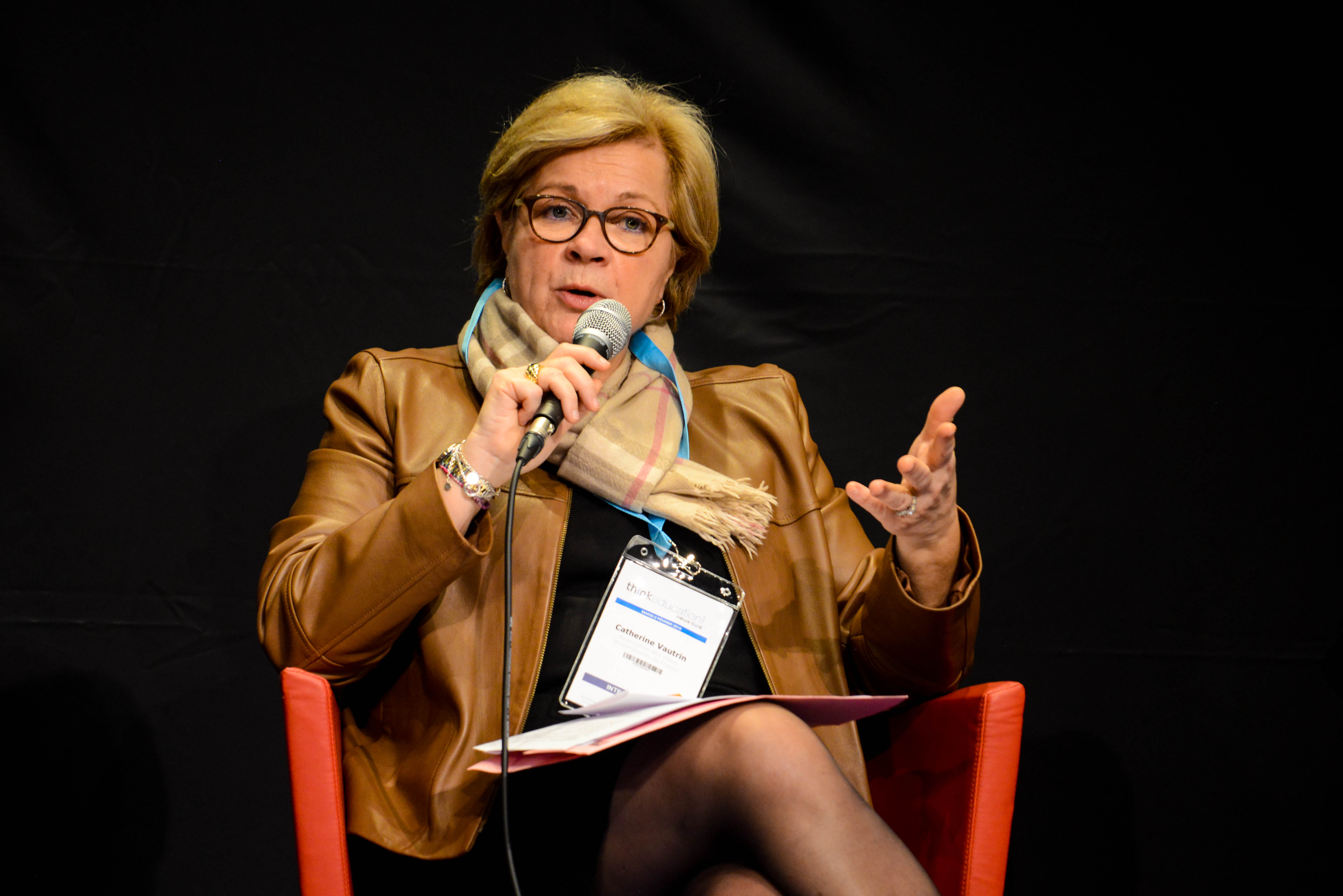 Intervention lors d'un colloque dédié à l'enseignement supérieur à Paris Dauphine.